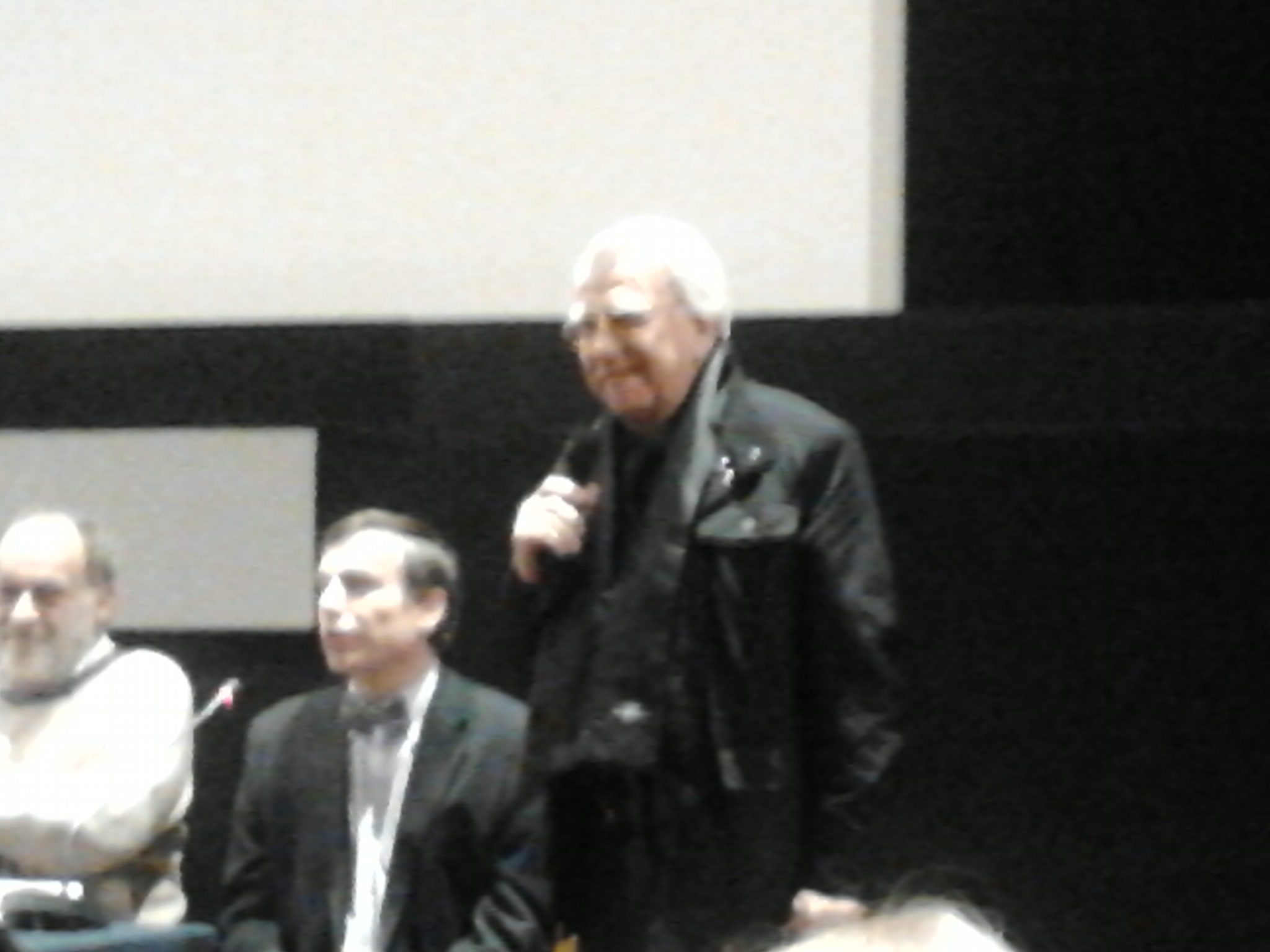 Realizador Dan Pita na Cinemateca Portuguesa, em Lisboa